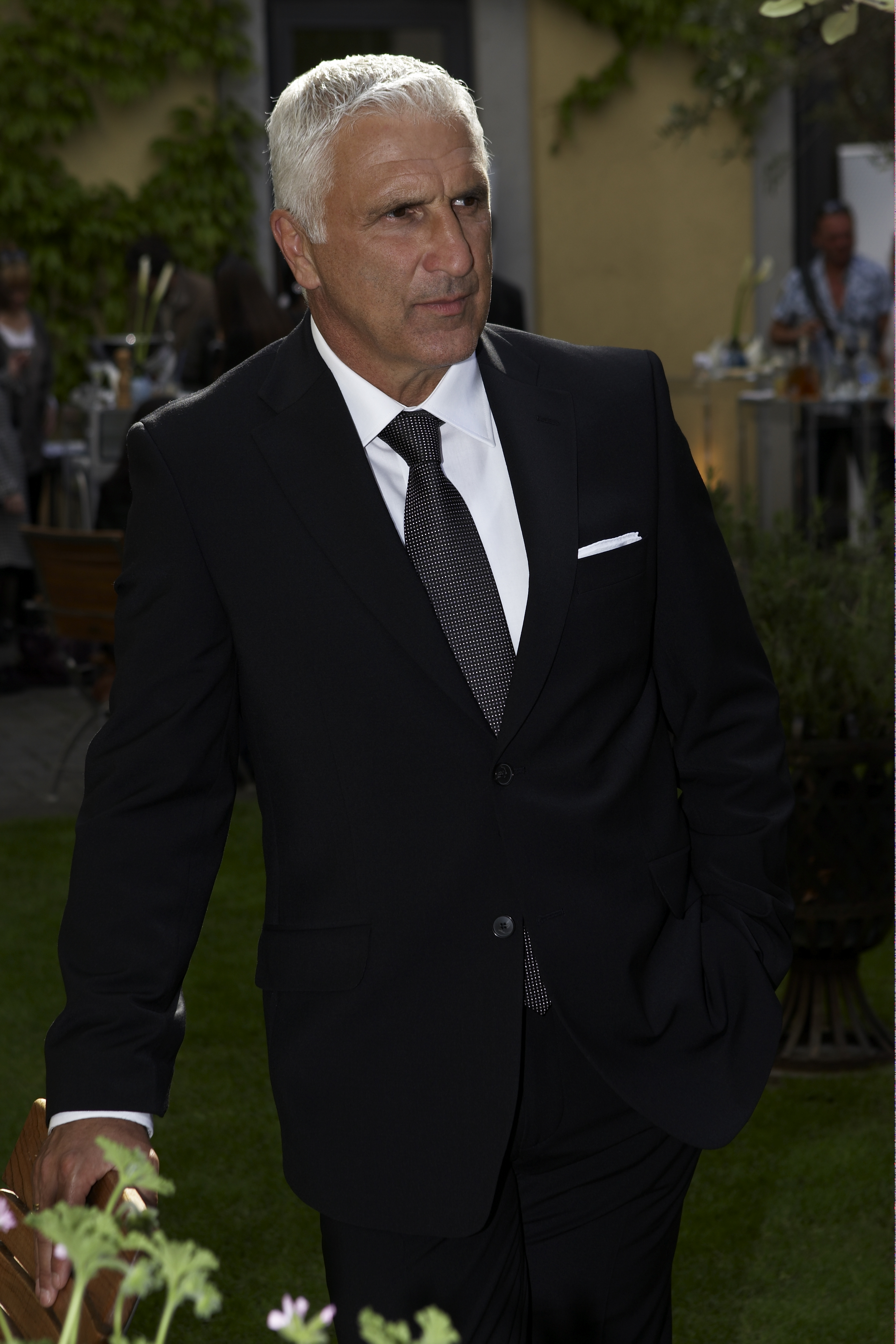 Hans Krankl backstage - während eines Shootings für das Modeunternehmen Kleider Bauer.